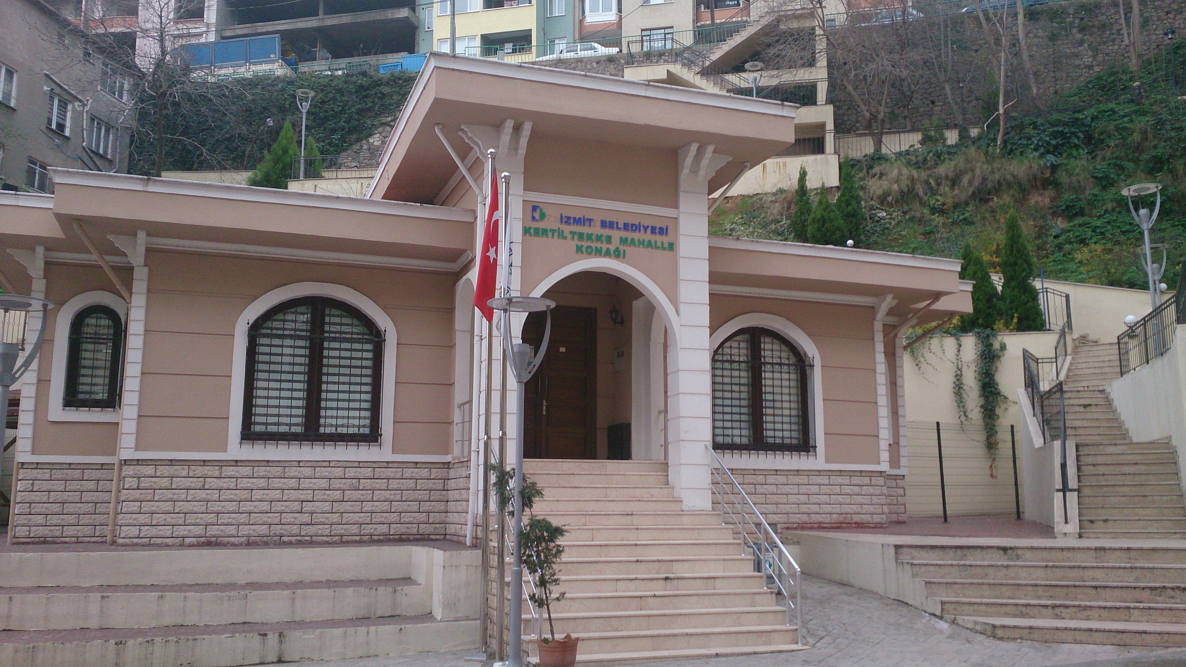 Hacıhızır & Veliahmet Muhtarlık Building